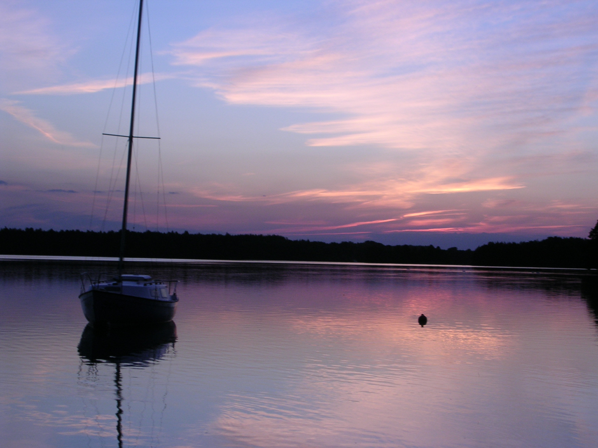 Jezioro Wdzydze fot. Szwedzki lipiec 2005